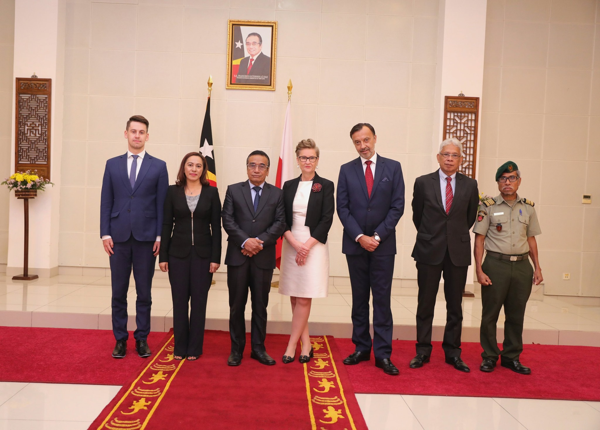 Präsident Francisco Guterres nimmt die Akkreditierung der neuen Botschafter in Osttimor entgegen: Finnland: Jari Sinkari Vereinigtes Königreich: Owen John Jenkins Polen: Beata Stoczynski Tetun: Prezidente Repúblika Francisco Guterres Lú Olo, ohin, simu karta kredensiál husi Embaixadór Finlandia, Jari Sinkari, Embaixadór Reinu Unidu, Owen John Jenkins, no Embaixadora Polónia, Beata Stoczynski atu hametin liután kooperasaun no amizade ho Timor-Leste.